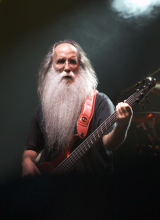 Leland Sklar in Trondheim, Norway, August 4, 2007.